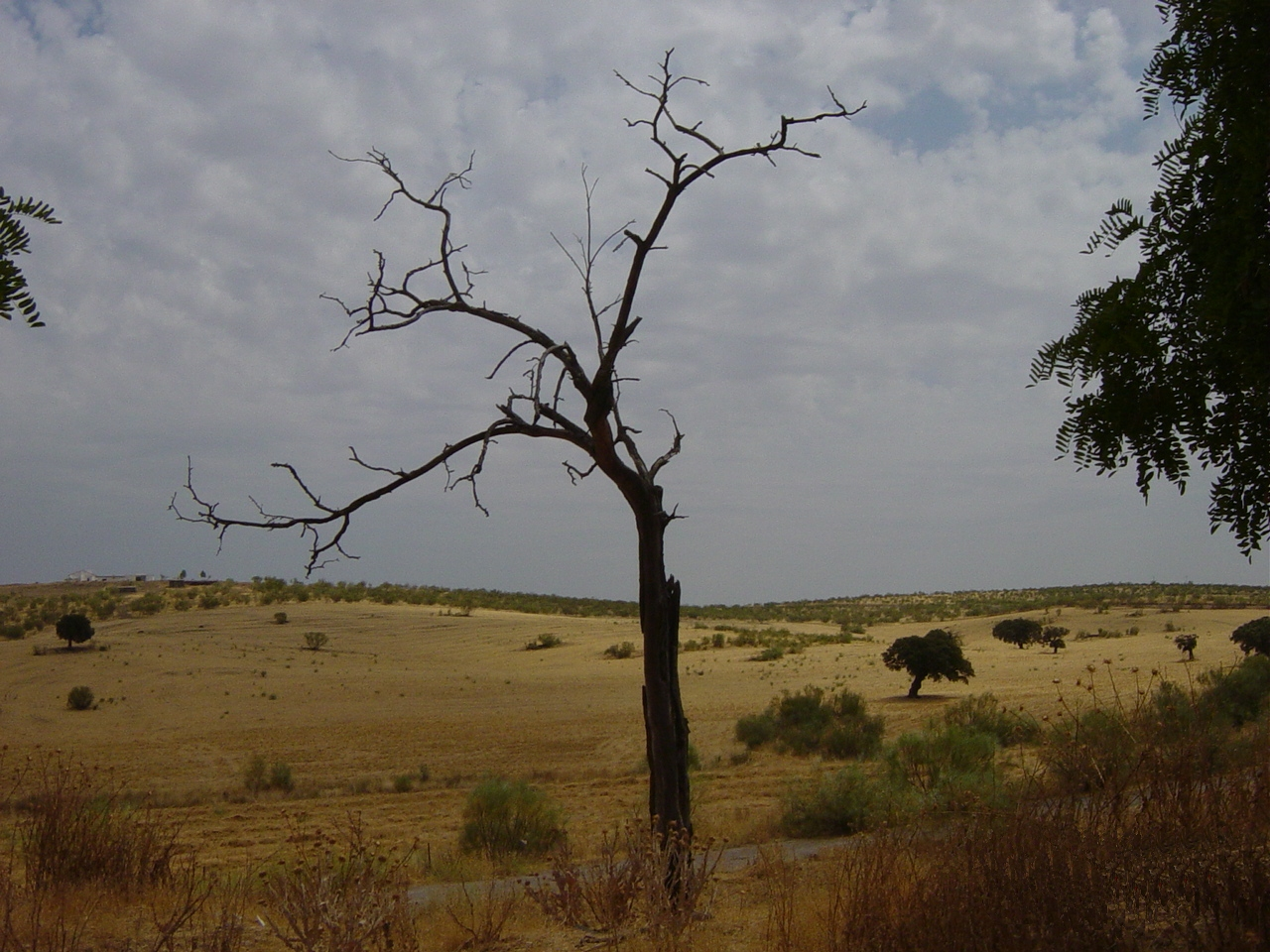 Paysage d'Extremadura (après modification horodatage)